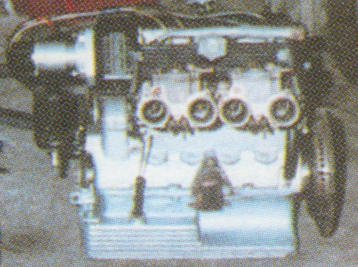 Motore Bandini 1000 c.c. foto tratta dal libro Bandini